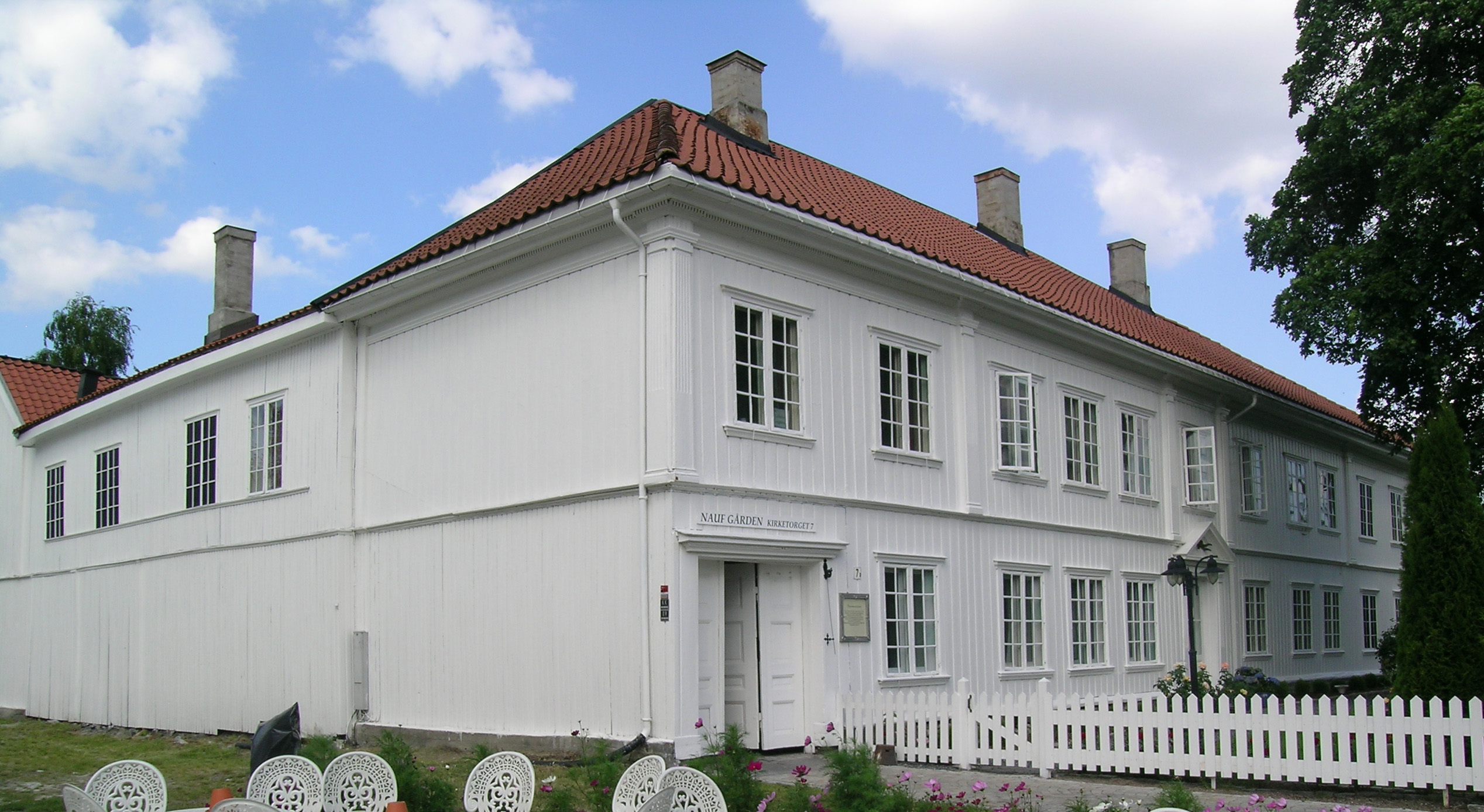 Kongsberg, Norway. Bergskrivergården.